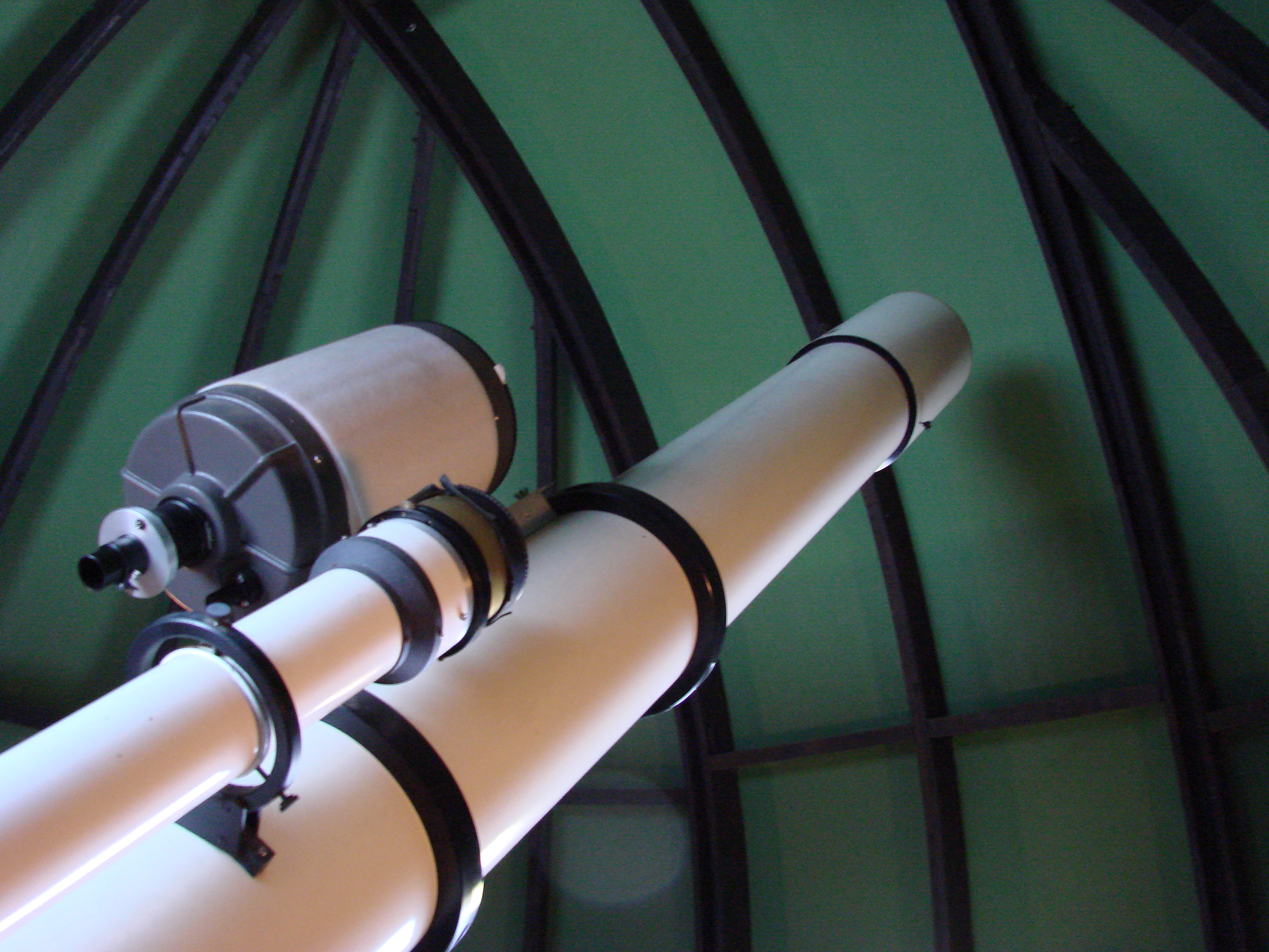 Großer Refraktor der Sternwarte Hannover.